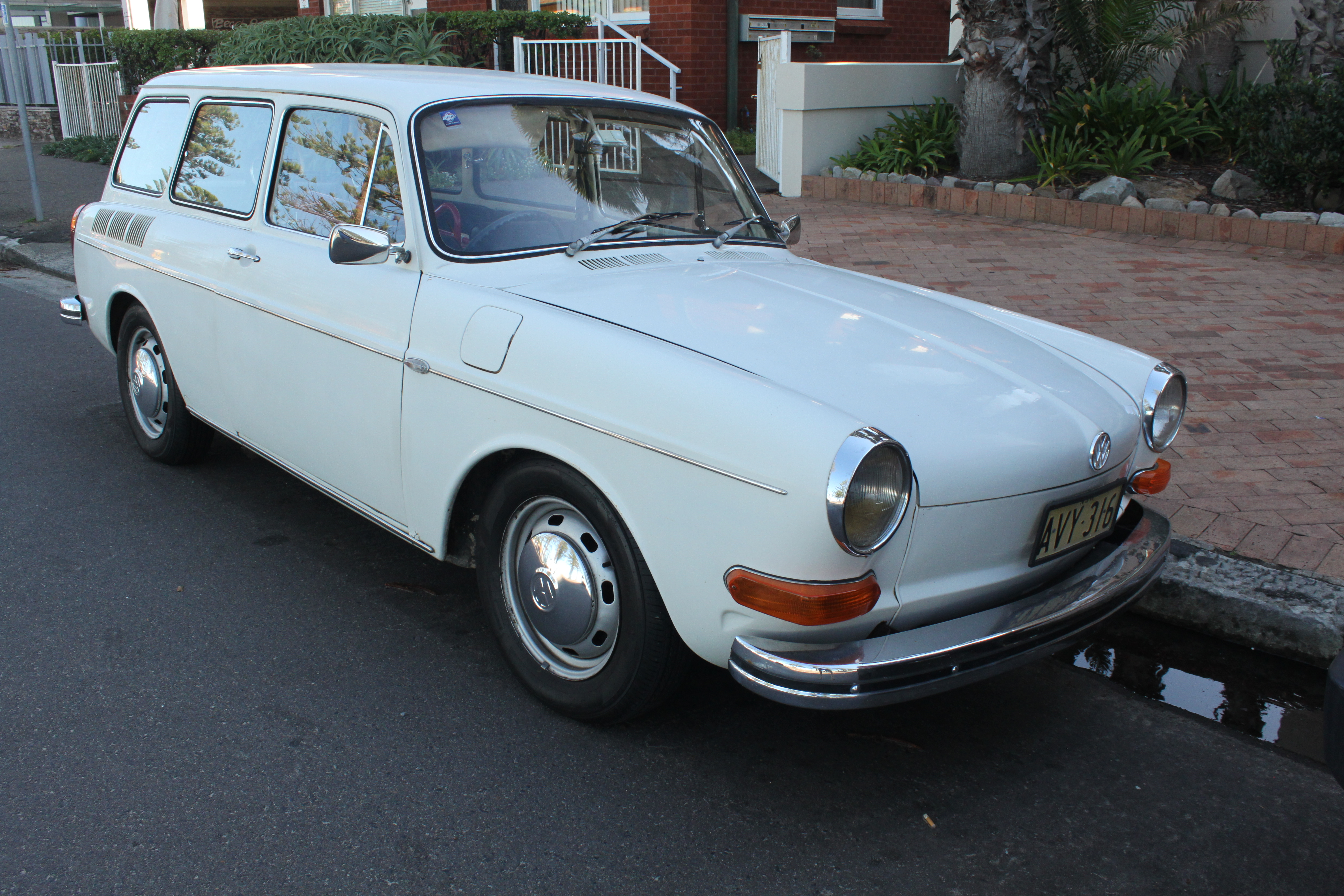 Volkswagen Type 3 Squareback